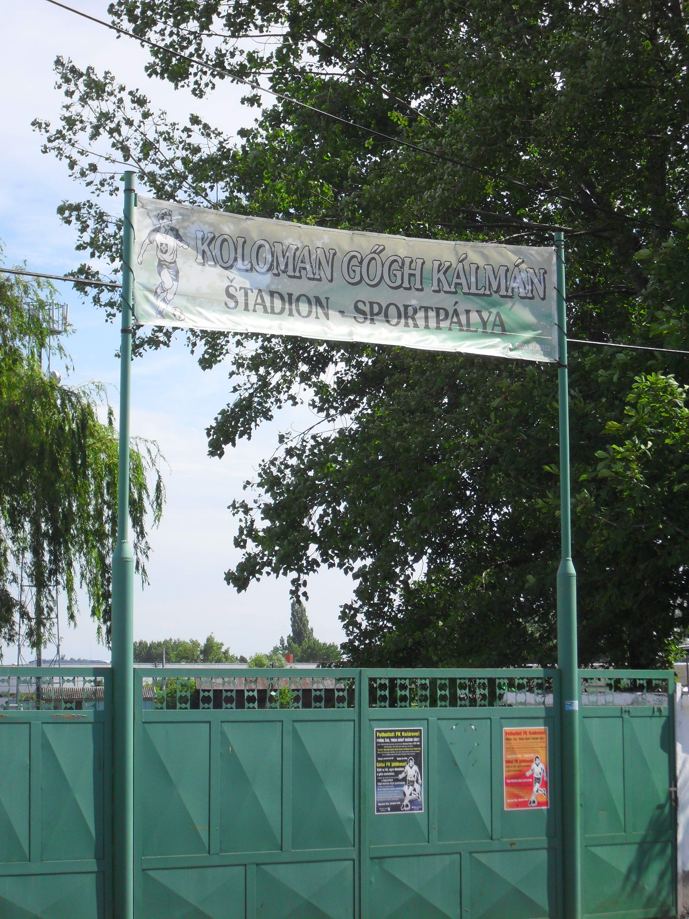 Gúta - stadion bejárata